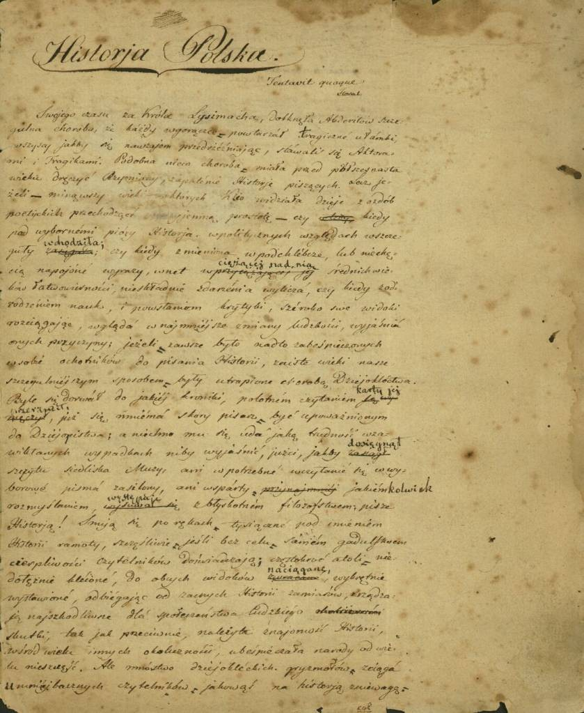 Erste Seite des Manuskripts „Historja Polska“ von Joachim Lelewel